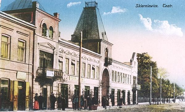 ul. Sienkiewicza; lata międzywojenne, na pierwszym planie budynek teatru, który w tamtym okresie był własnością gminy żydowskiej. Budynek stoi do dziś